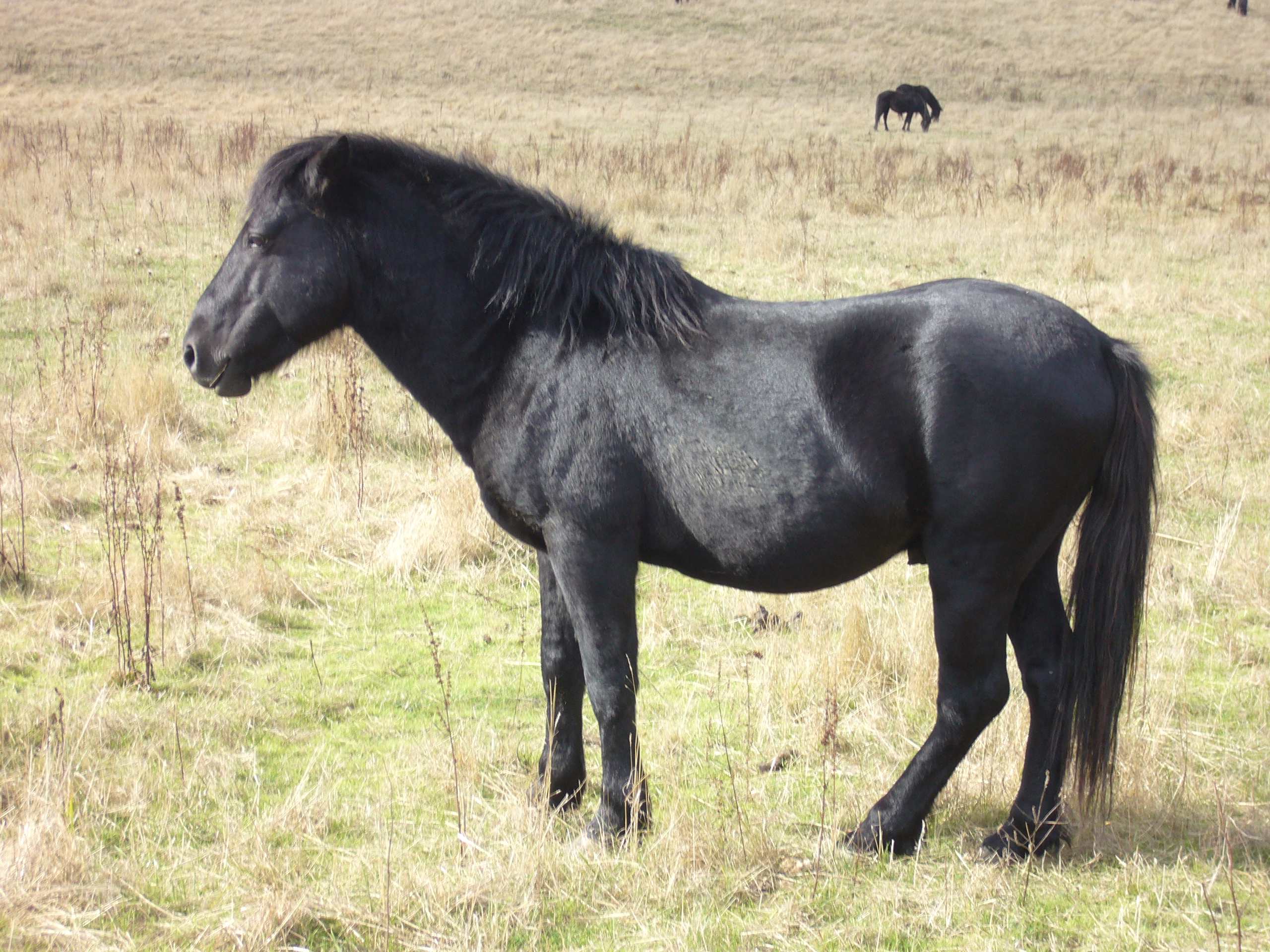 Lauzako zaldia Pancorbon.